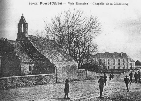 Photographie début XXe siècle de la chapelle de la Madeleine, disparue en 1970, à Pont-l'Abbé, dans le Finistère, en Bretagne.